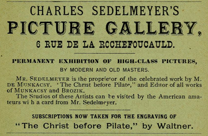 Advertisement, Paris